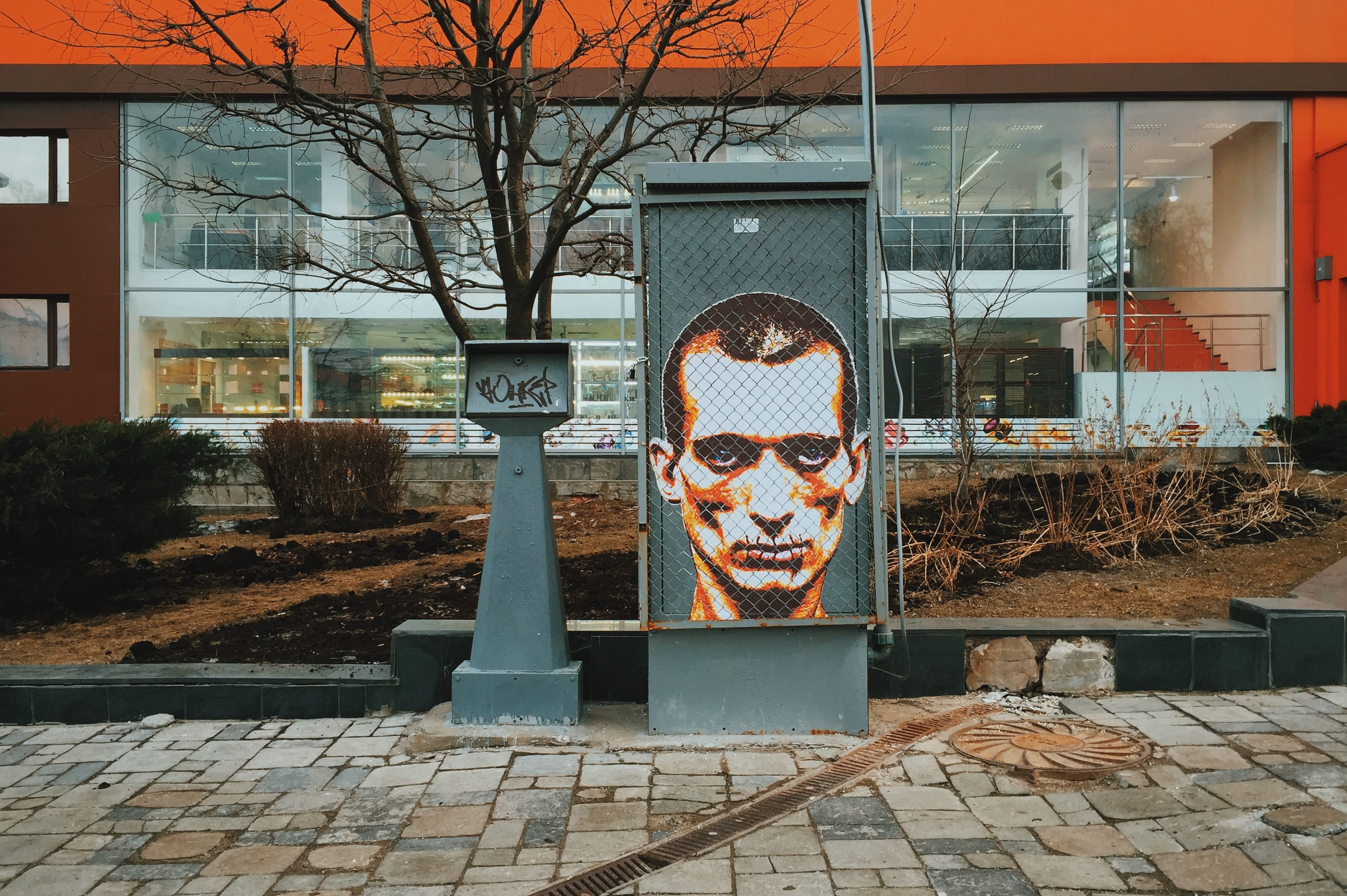 Верхняя Сыромятническая улица. Граффити с зашитым Петром Павленским.